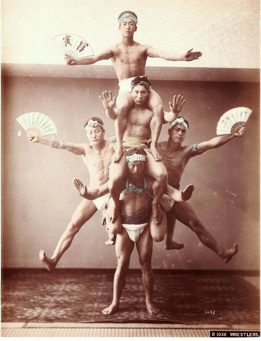 日本の大道芸